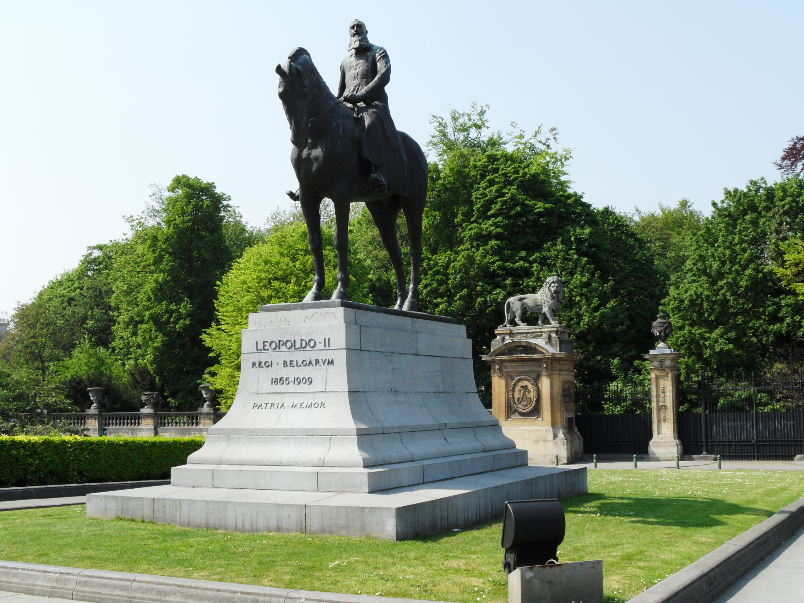 Leopold II Statue at Place du Trône